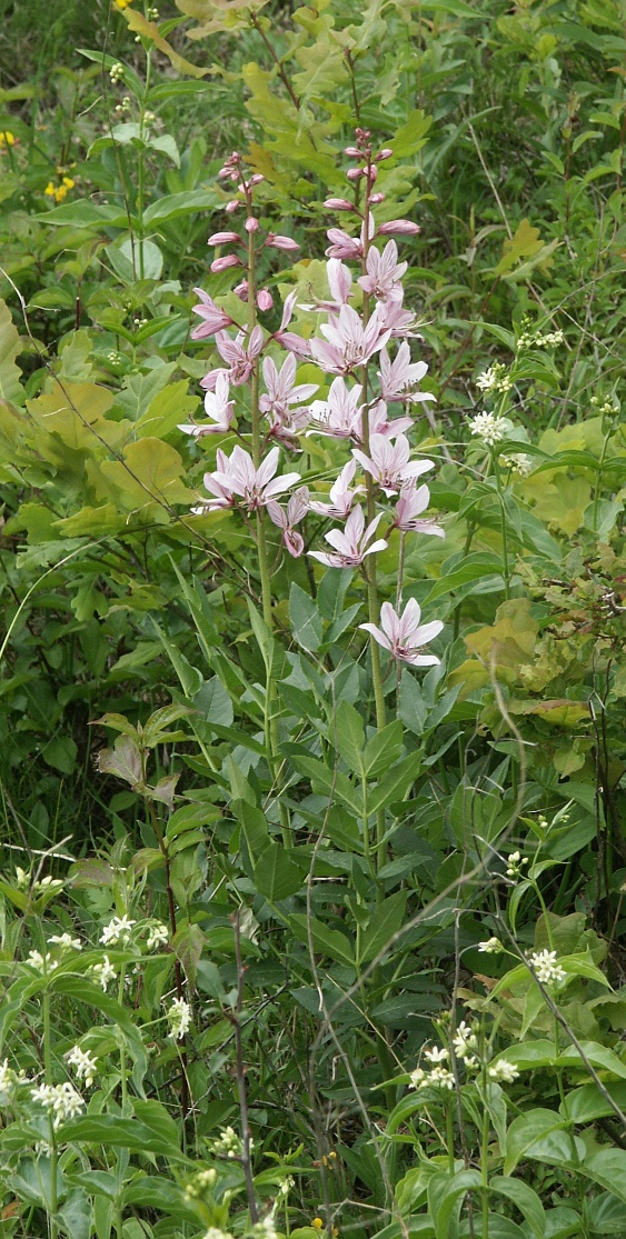 Dictamnus albus, Tauberland, Germany